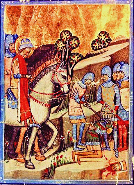 Stephen I executing the rebel Koppány